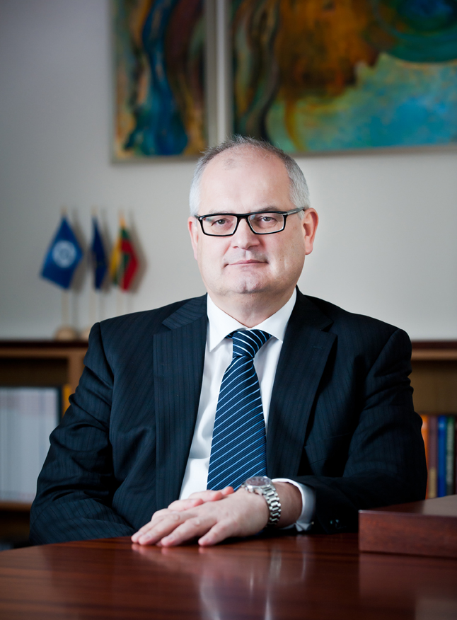 VGTU rektorius Alfonsas Daniūnas